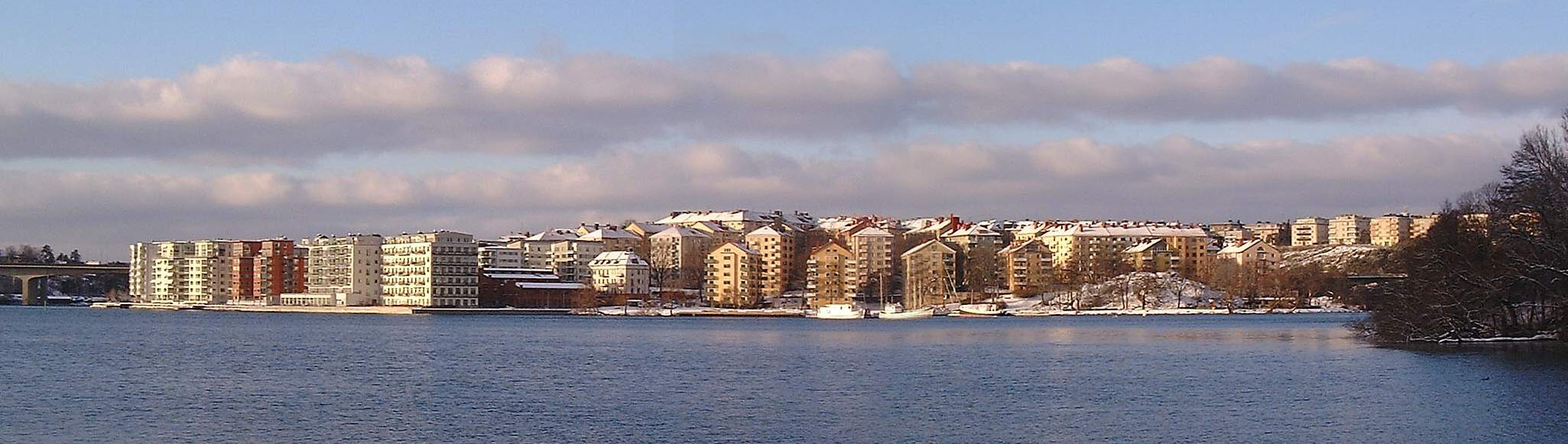 Lilla Essingen from Reimersholme.